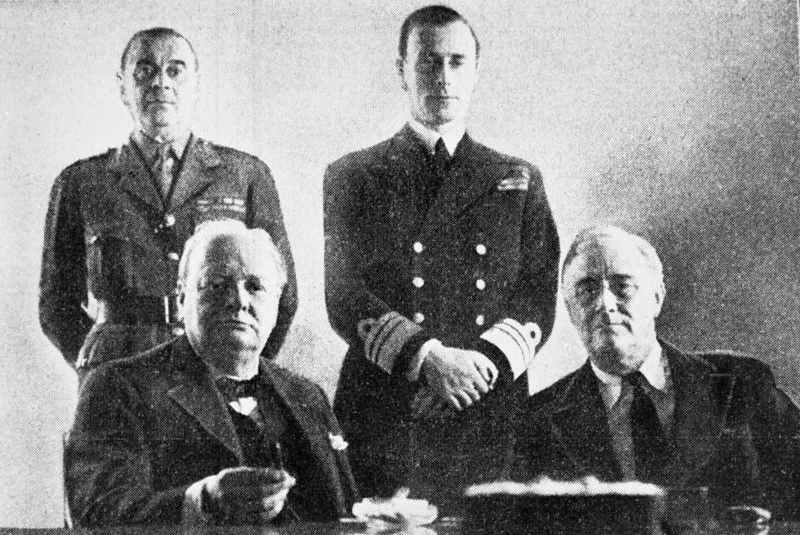 Konferenz von Casablanca II. Weltkrieg 1939-45 Konferenz zwischen dem amerikanischen Präsidenten Franklin Dolano Roosevelt und dem britischen Ministerpräsidenten Sir Winston Churchill im Januar 1943 in Casablanca. Hier wurde von ihnen die bedingungslose Kapitulation Deutschlands als Voraussetzung für die Beendigung des Krieges festgelegt. U.B.z.: sitzend von links: Churchill und Roosevelt; stehend: Generalleutnant Hastings Ismay und Admiral Lord Louis Mountbatten Abgebildete Personen: Roosevelt, Franklin Delano: Präsident, Gouverneur des Staates New York, USA Churchill, Winston: Premierminister, Großbritannien (GND 118520776) Mountbatten, Louis Lord: Admiral, Chef des Generalstabs, Oberbefehlshaber der NATO-Streitkräfte im Mittelmeer, 1979 bei IRA-Attentat getötet, Großbritannien Ismay, Lionel Hastings Lord: Generalsekretär der NATO, Großbritannien